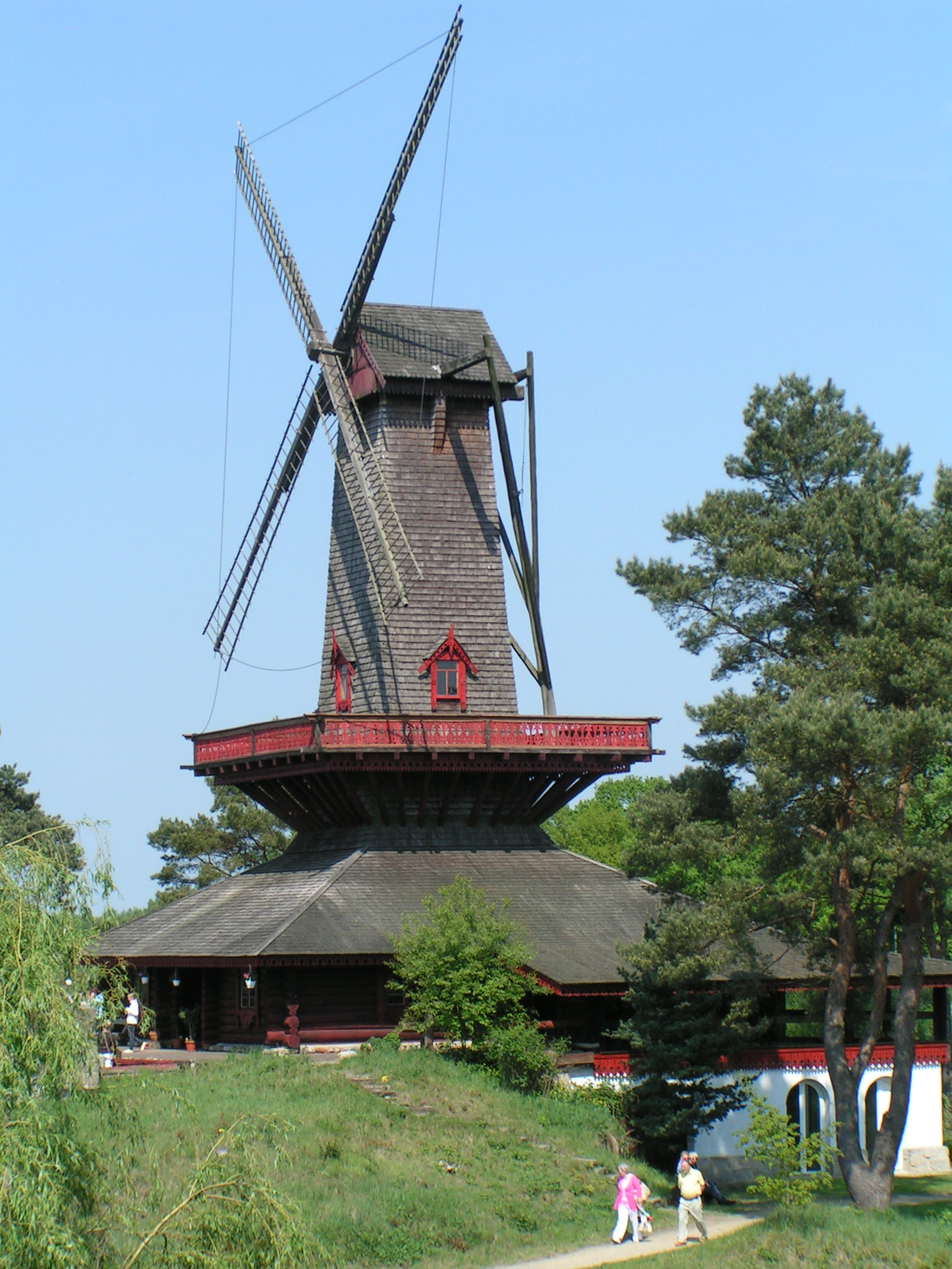 Ukrainische Windmühle Natascha im Internationalen Mühlenmuseum Gifhorn